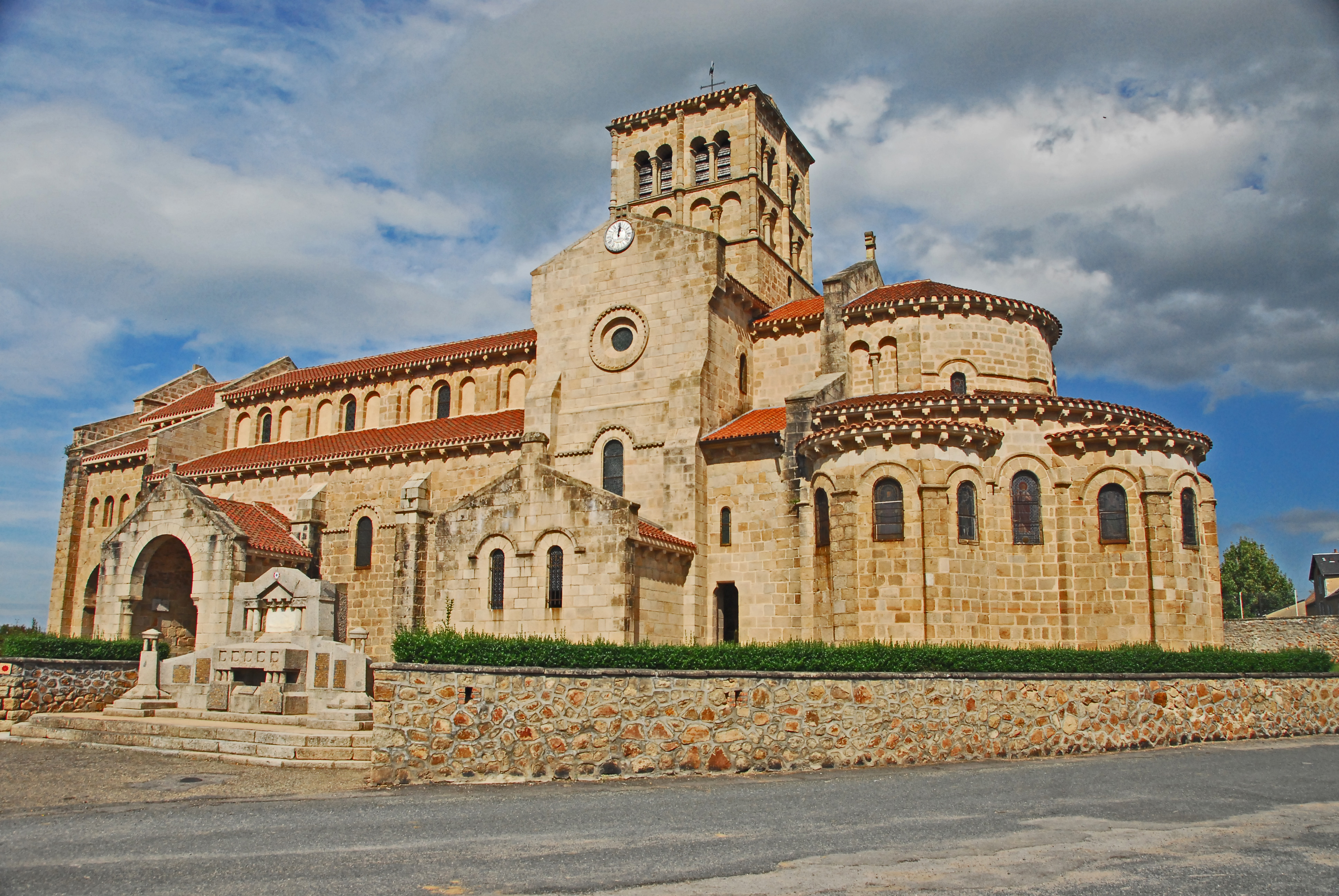 N.-D. de Châtel-Montagne, Ansicht von SSO